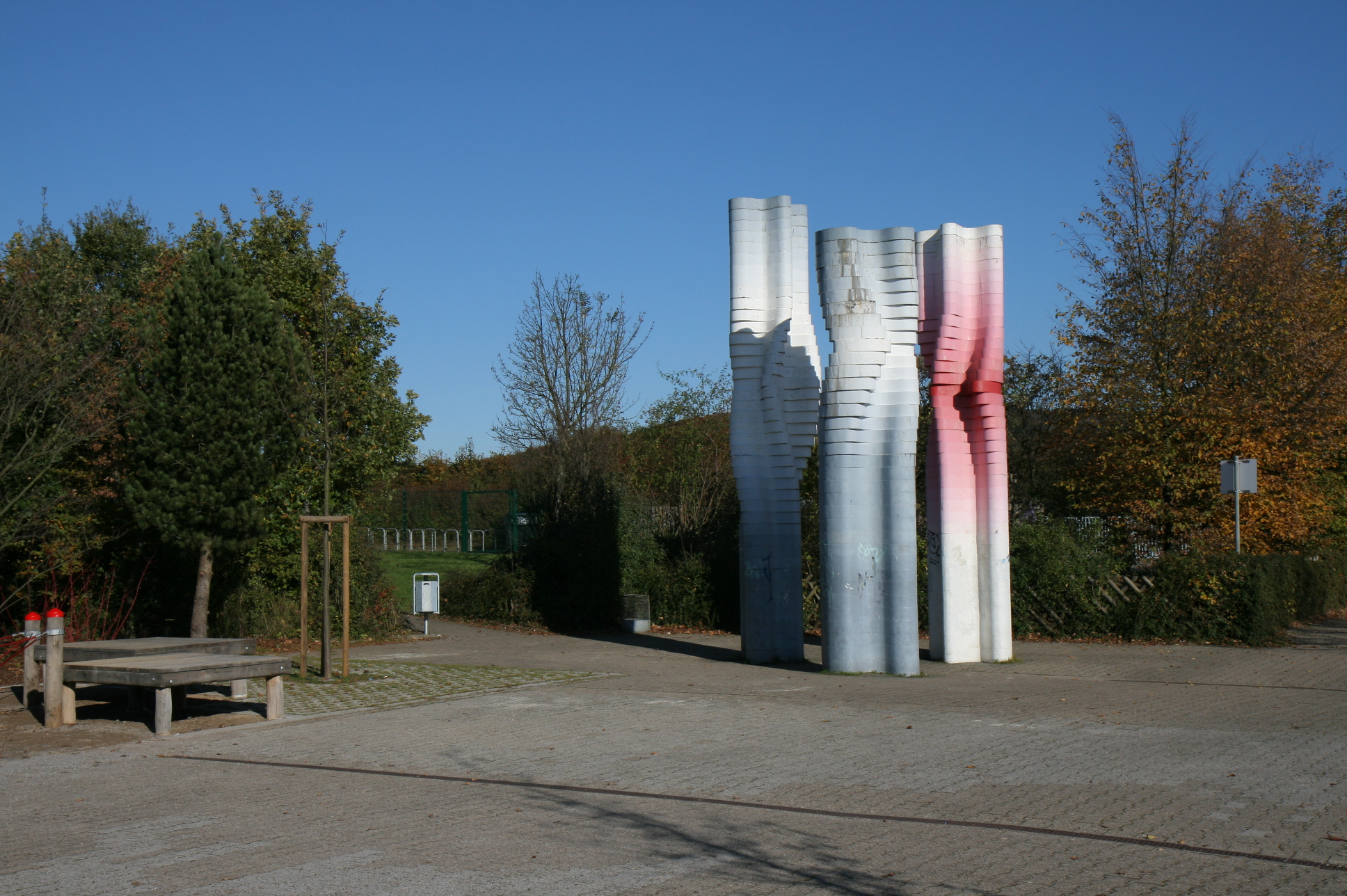 Skulptur „Drei Stelen“ (1977) des Bildhauers Waldemar Wien auf dem Gelände des Schulzentrums Hemberg in Iserlohn.